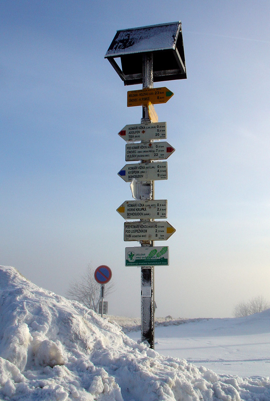 Voitsdorf (Fojtovice): Wegweiser im Winter